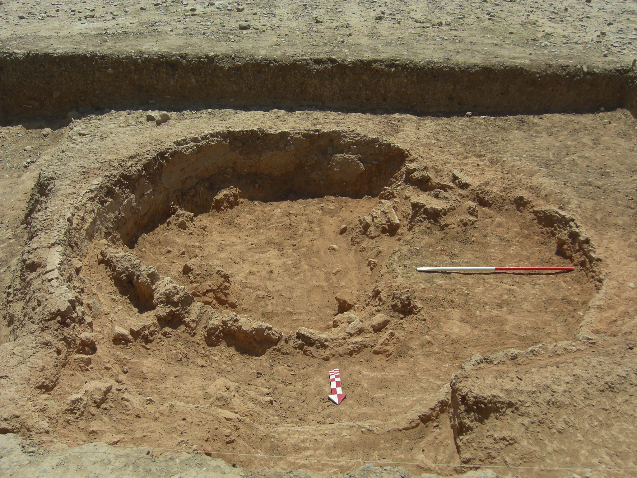 این عکس مربوط به کوره سفالگری در شهر بلقیس منعلق به دوره سلجوقی است که توسط احمد نیک گفتار تهیه گردیده است